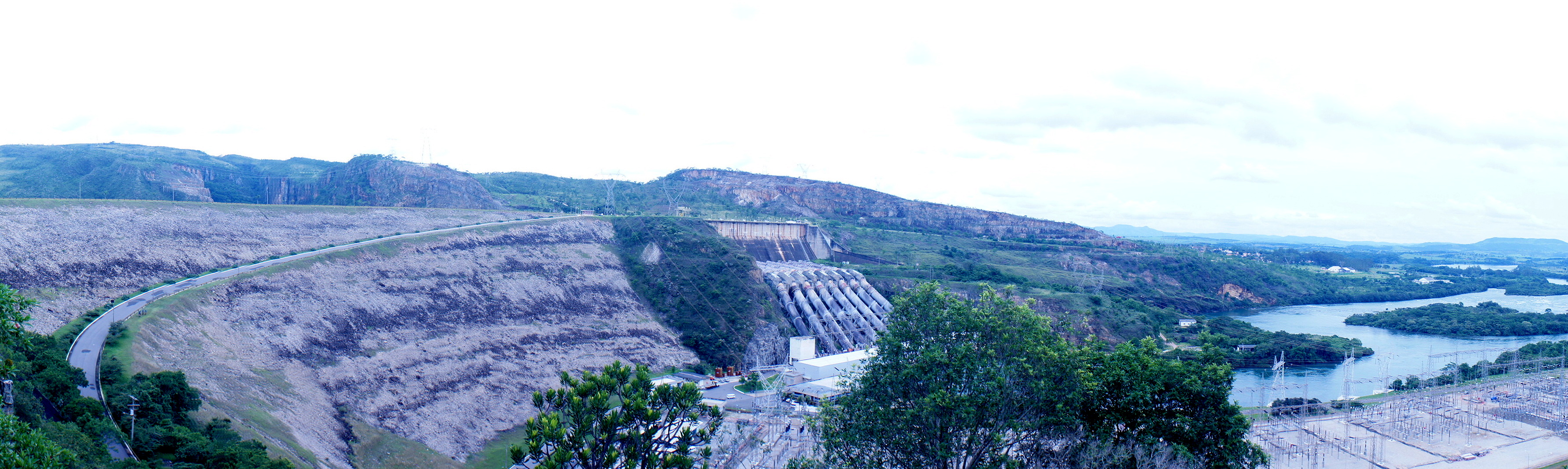 Foto da Barragem de Usina Hidrelétrica de Furnas em 01/12/2012.